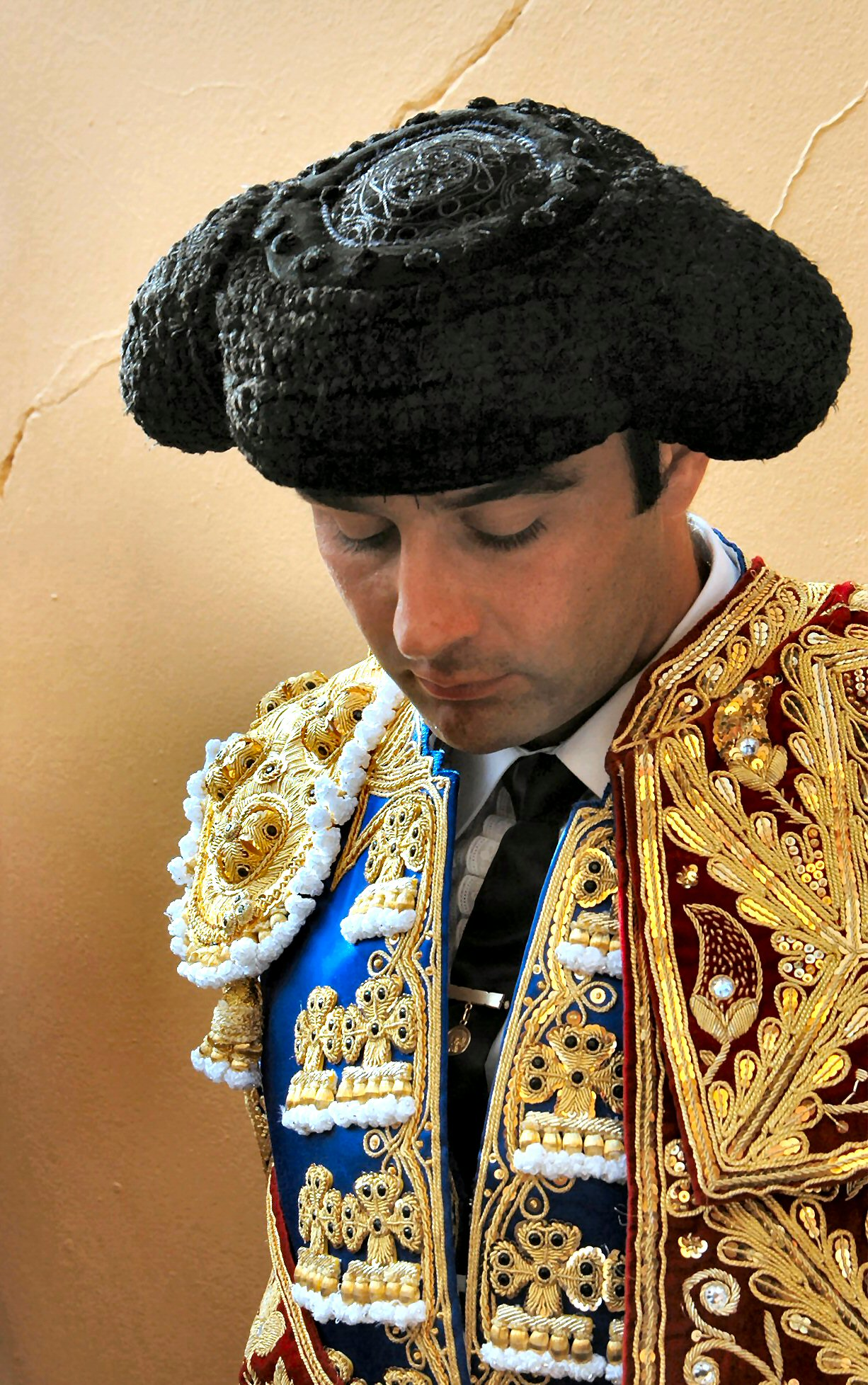 Enrique Ponce en pleine concentration, Bayonne, Septembre 2004